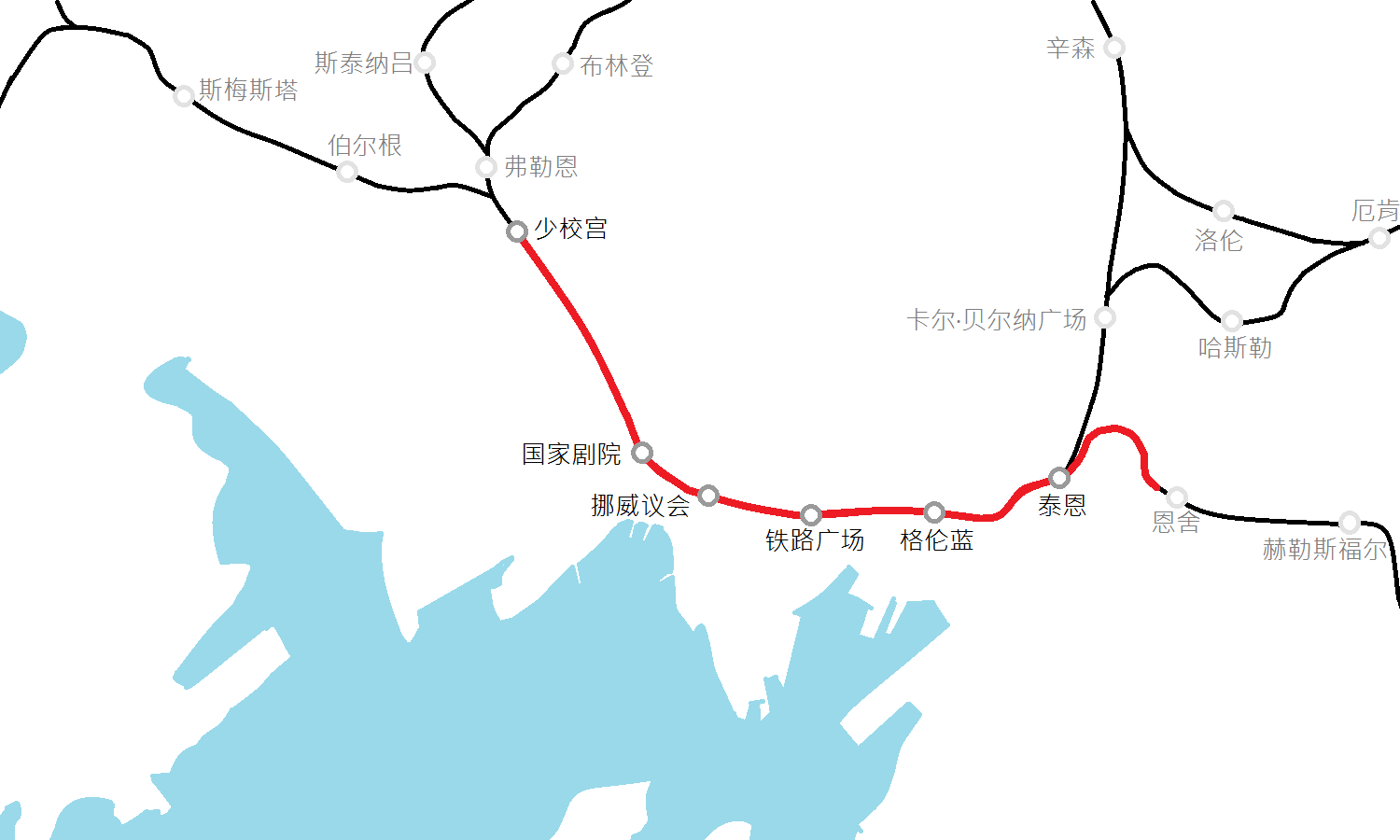 共用隧道的地图。红色路线表示共用隧道。